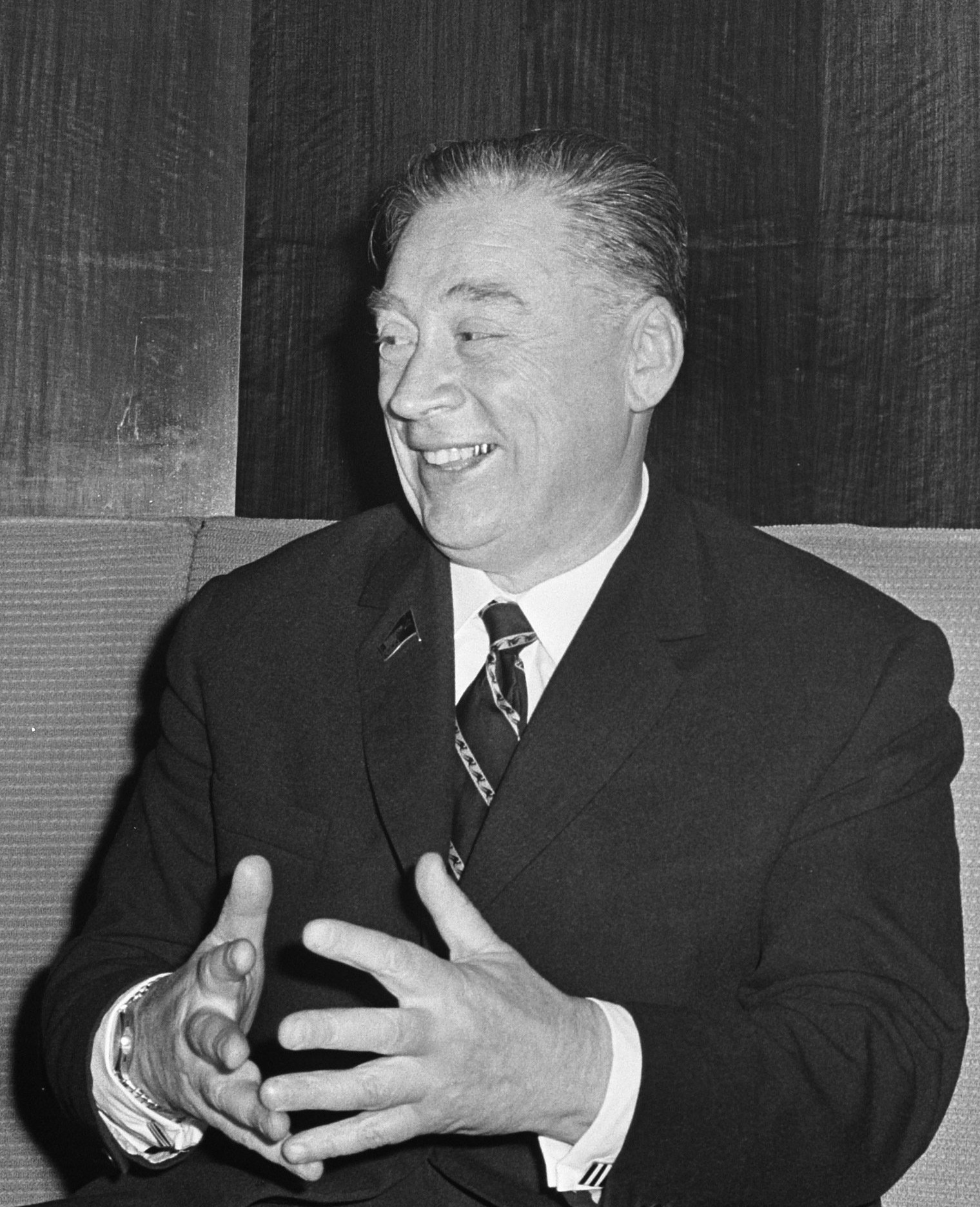 Aankomst van de Russische minister van burgerluchtvaart Loginov op Schiphol